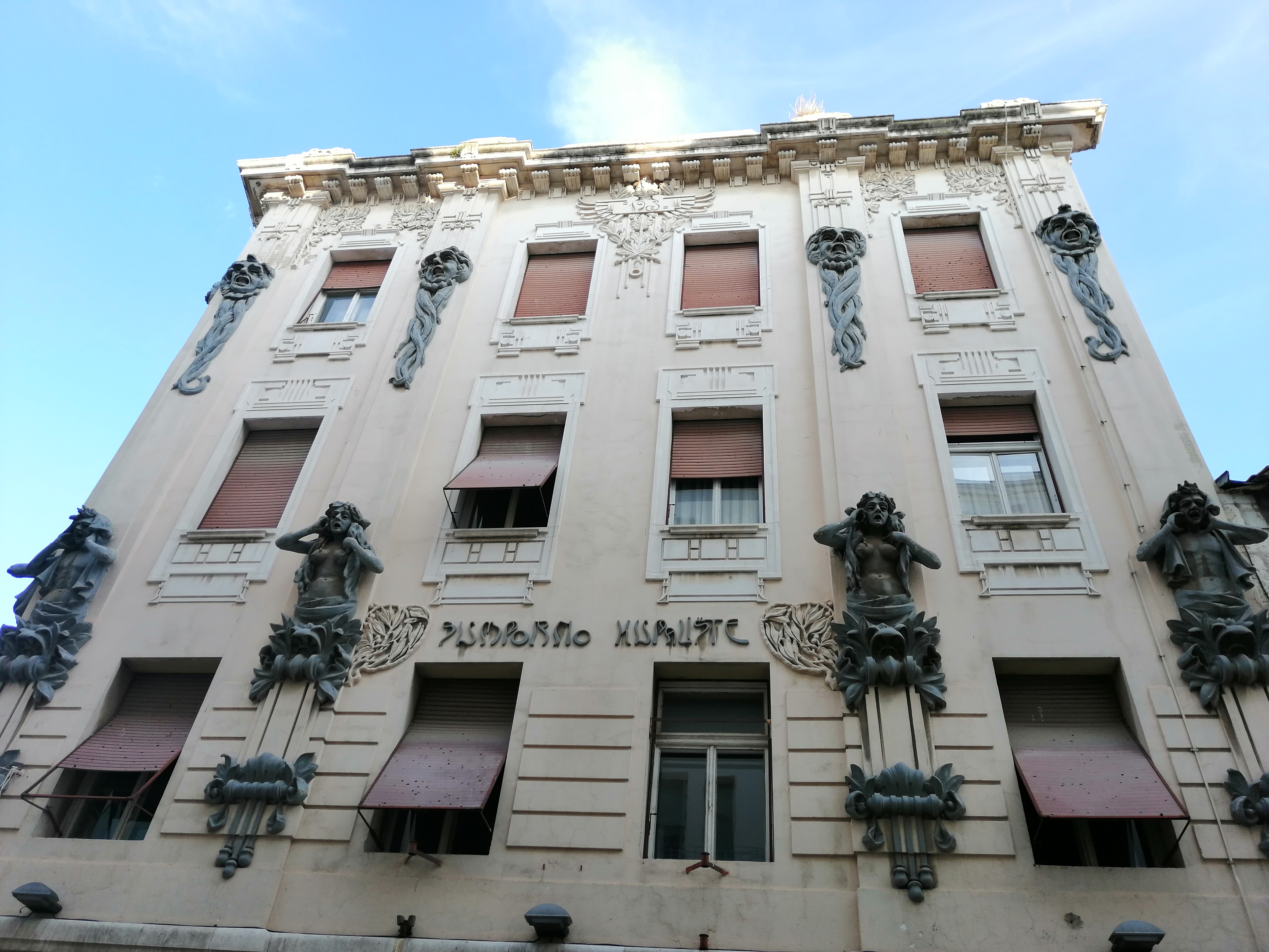 Kamilo Tončić je duhu secesije projektirao Sumporno kupalište (1903.), prvu zgradu izgrađen u u stilu secesije u Splitu i smjestio je iznad ljekovitih sumpornih vrela u Marmontovoj ulici.